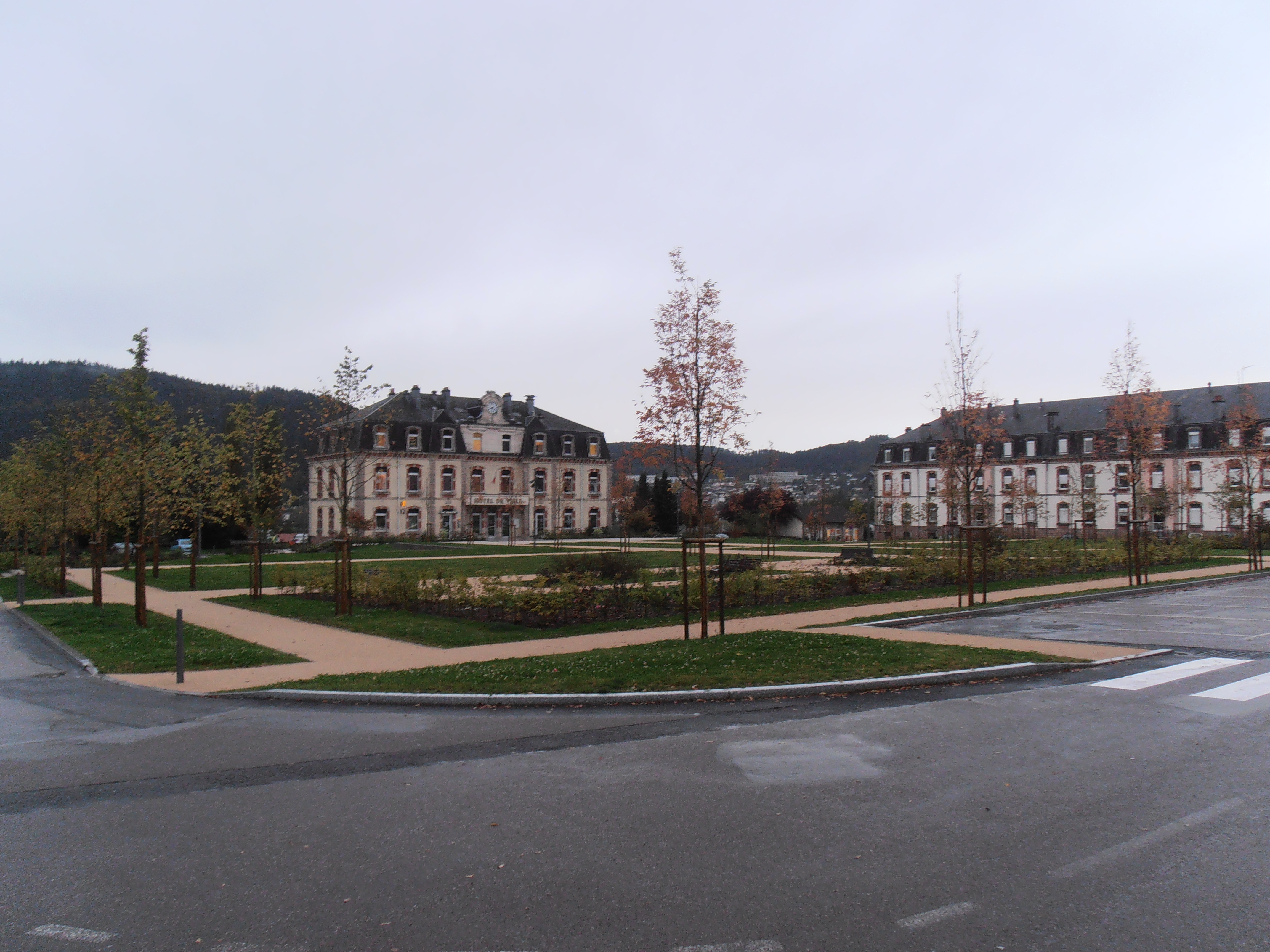 Vosges, Saint-Etienne-lès-Remiremont, La place d'armes, terrain stabilisé où le foot a été pratiqué durant de nombreuses années, a été réaménagée pour devenir un lieu de rencontre